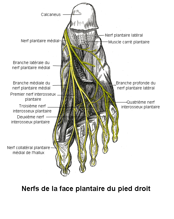 Nerfs de la face plantaire du pied droit. Anatomie humaine